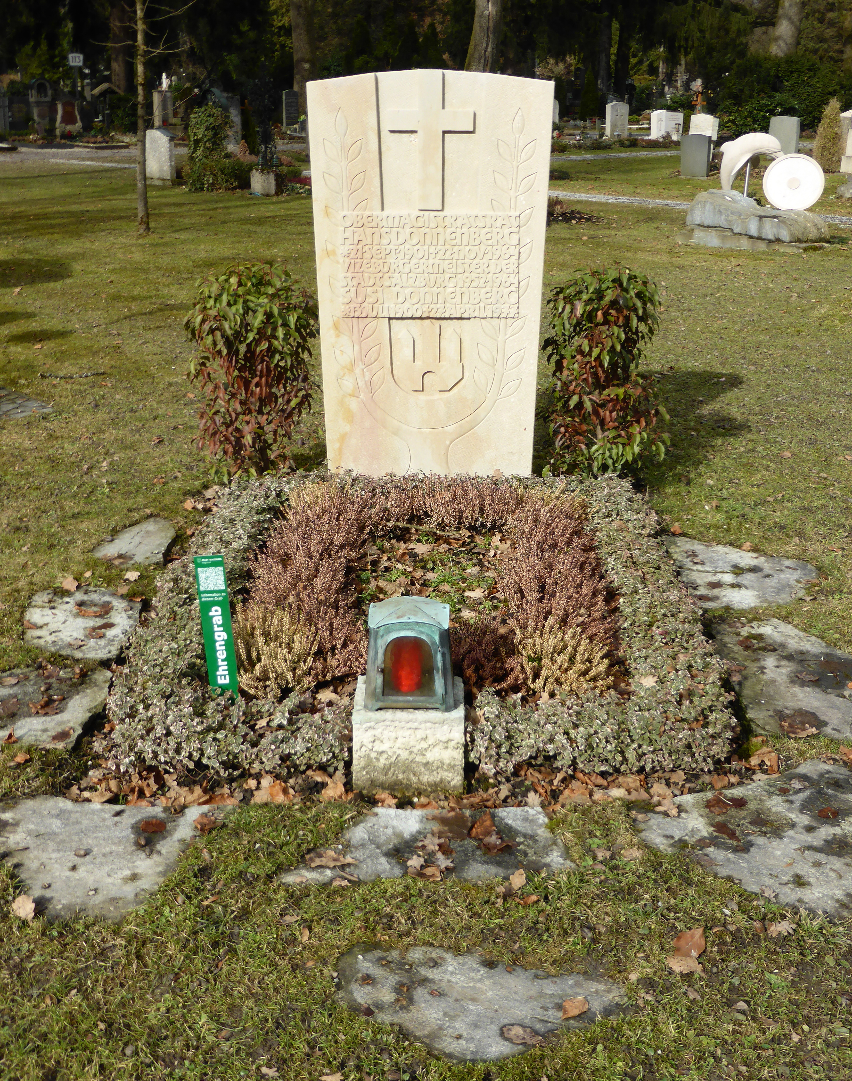 Salzburger Kommunalfriedhof, Grabstätte von Hans Donnenberg.